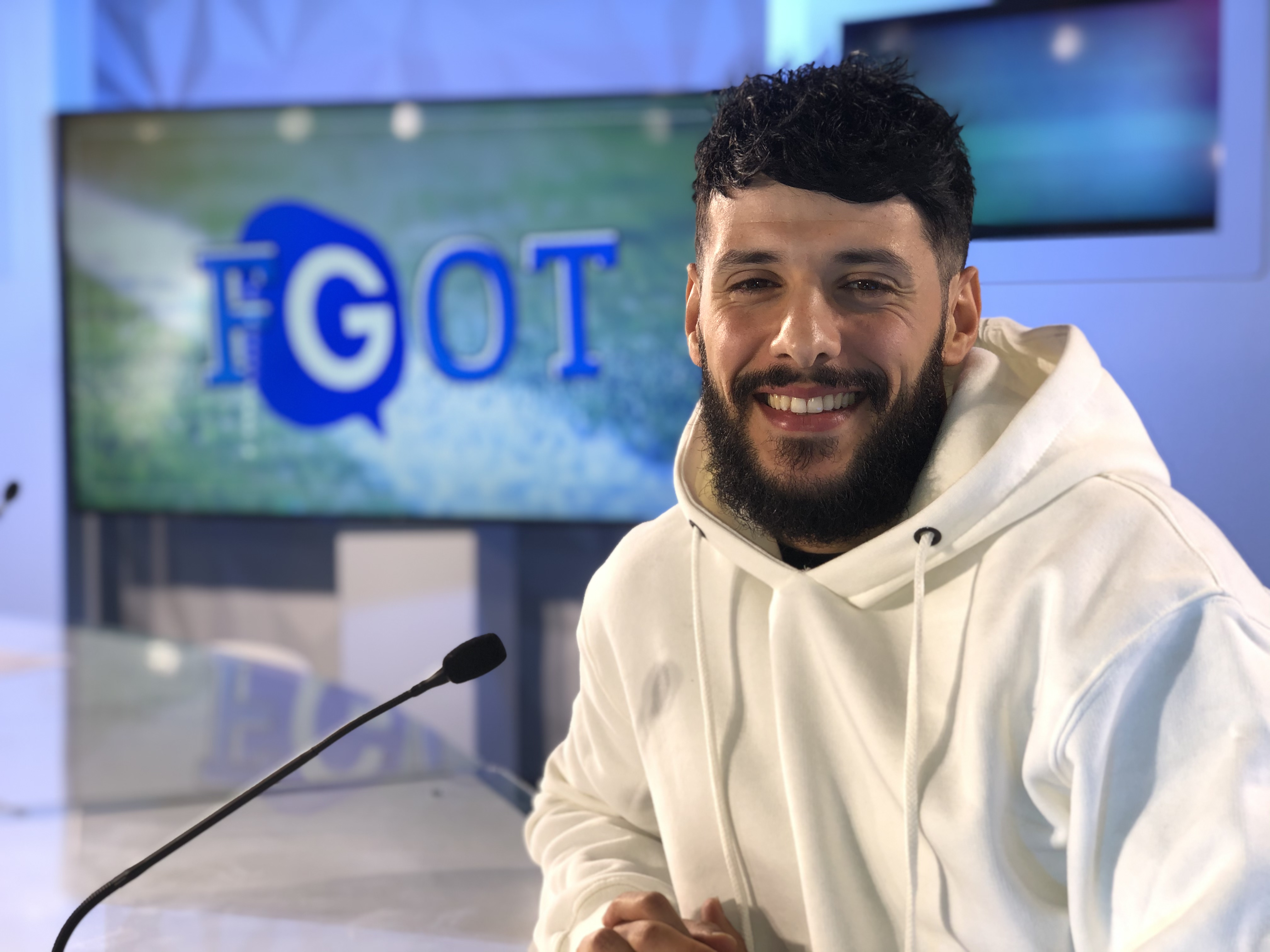 Farès Hachi sur le plateau de téléGrenoble